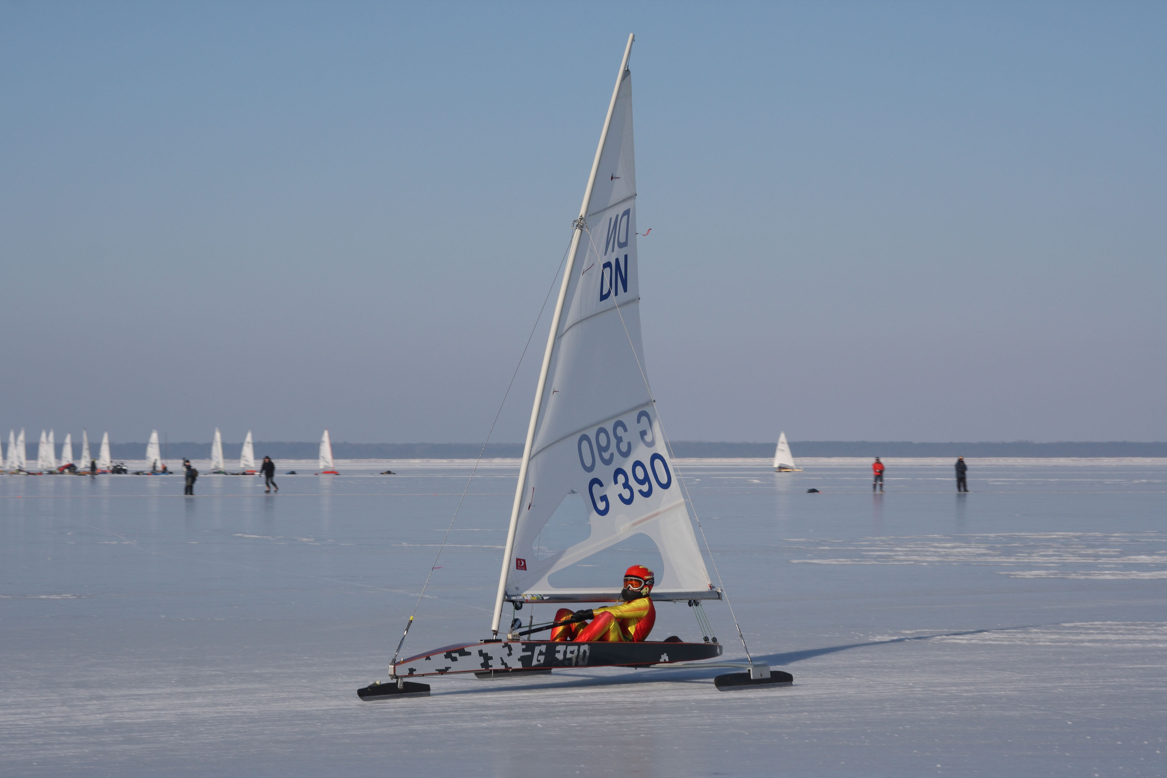 DN klassi Euroopa meistrivõistlused 2011